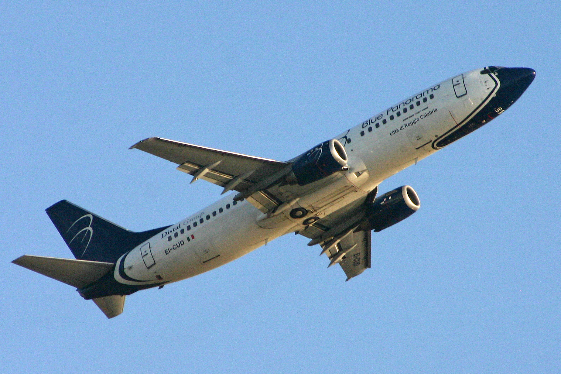 msn 26298, l/n 2564. Rome Fiumicino 21-10-2011